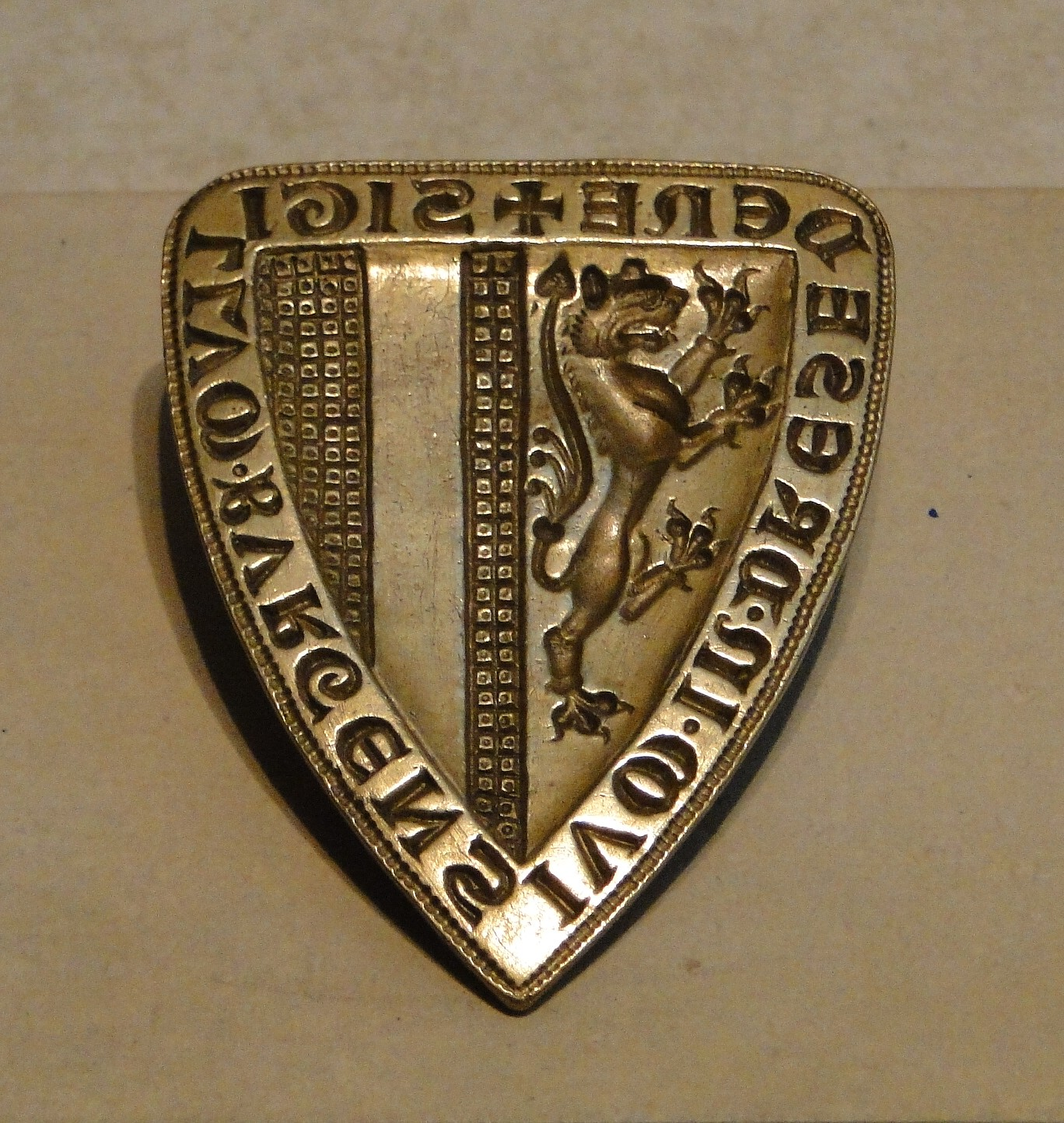 Ältester Ratssiegelstempel der Stadt Dresden mit Dresdner Wappen; Messing 1309